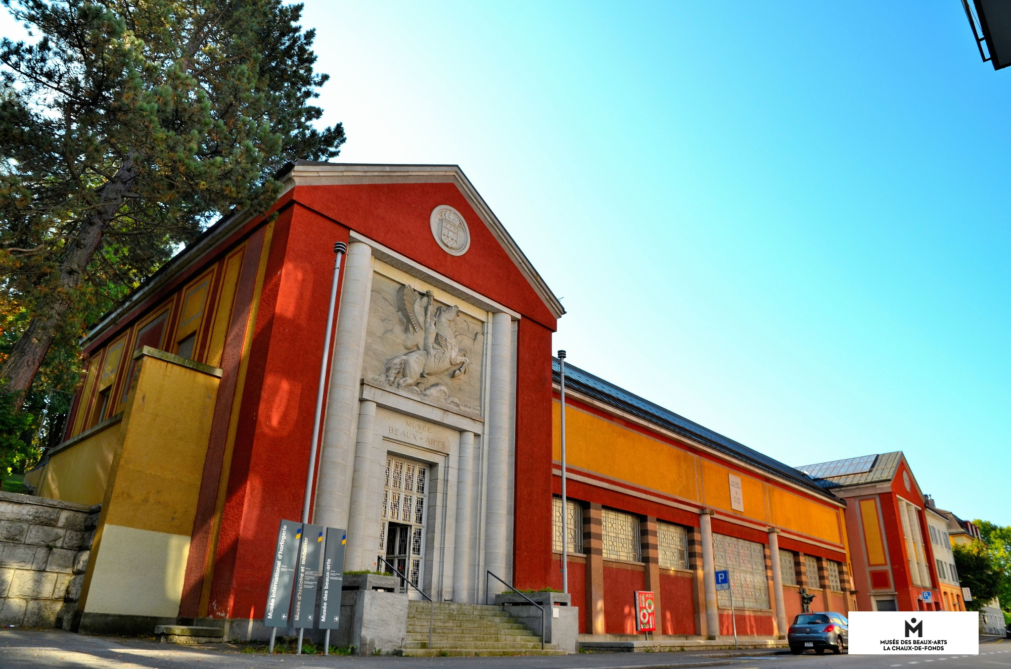 Le bâtiment actuel, classé monument historique, est remarquable par la polychromie de ses façades, l'ordonnance et clarté de ses salles et son décor. Il a été construit dans un style art déco de tendance néo-classique par l'architecte René Chapallaz et l'artiste Charles L'Eplattenier, maître du futur Le Corbusier à l'Ecole d'art de la Ville.